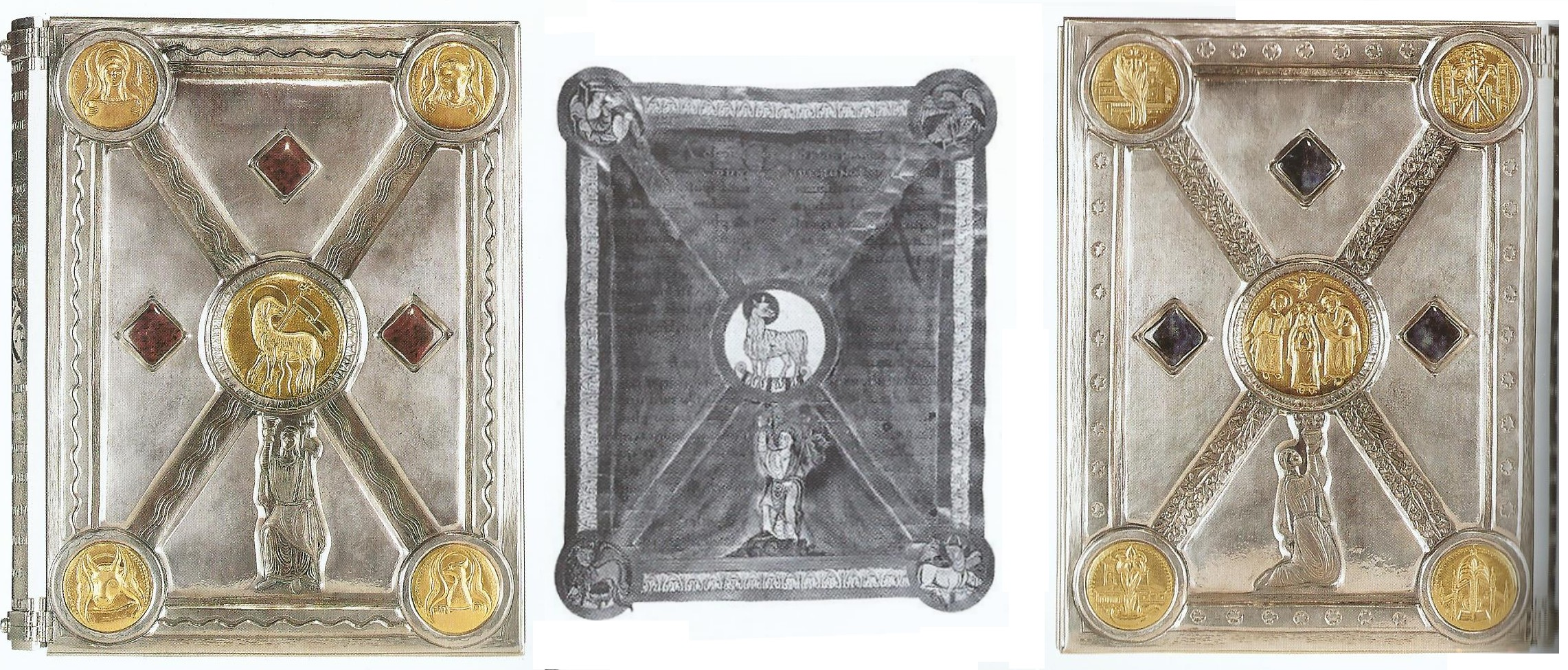 Riproduzione della sovraccoperta dell'evangeliario di Como. Al centro il modello da un codice di Fulda